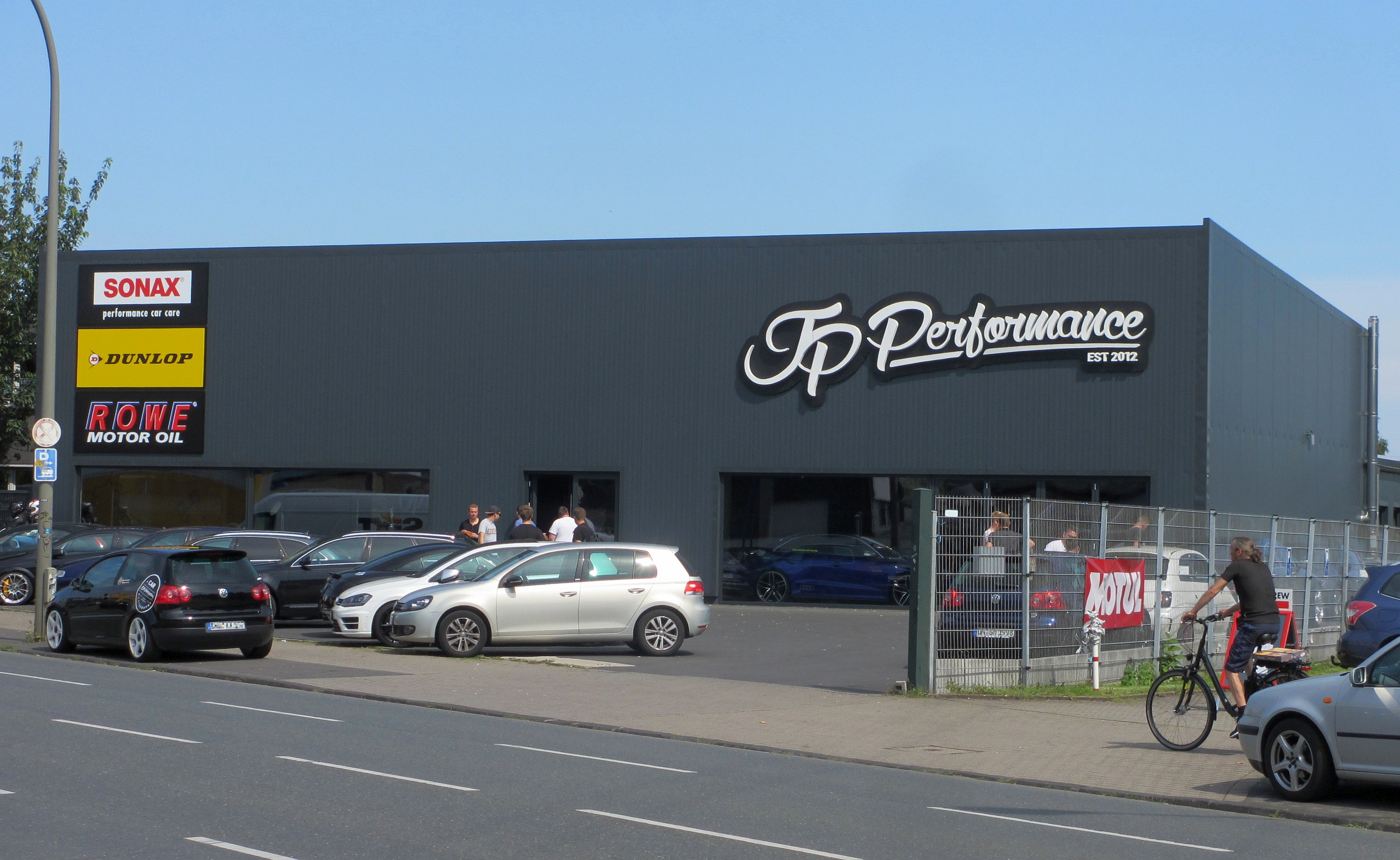 Das Dortmunder Hauptgebäude der Tuning-Werkstatt JP Performance von JP Kraemer.